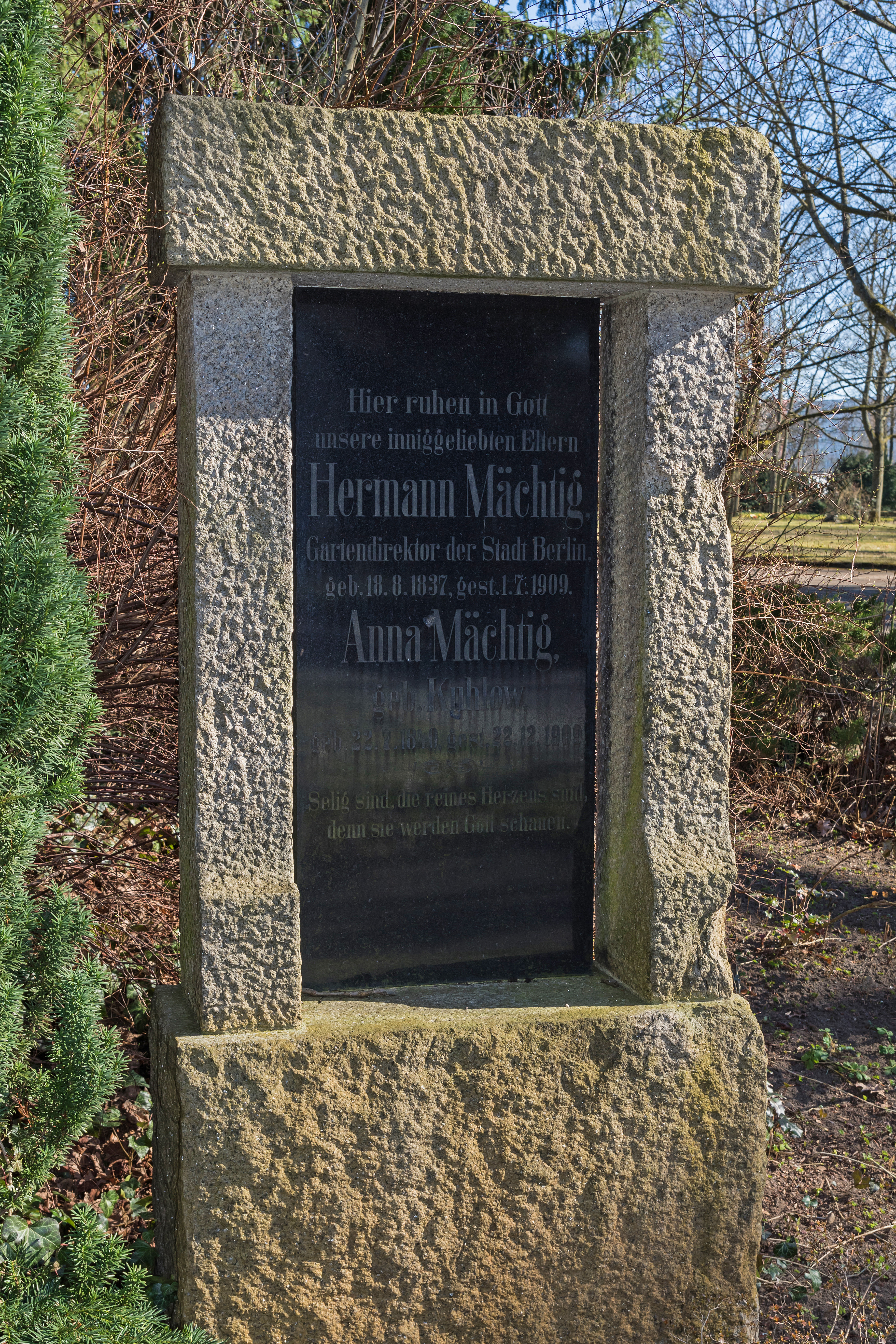 Zentralfriedhof Friedrichsfelde, Berlin-Lichtenberg. Grab von Hermann Mächtig.